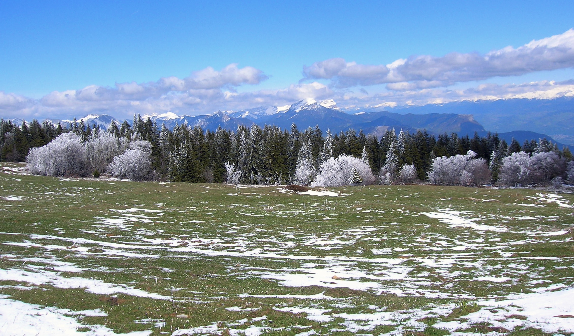 randonnée pas de l'Ours - ENS La Molière et Sornin- vers Engins. Engins, Isère, AuRA, France.